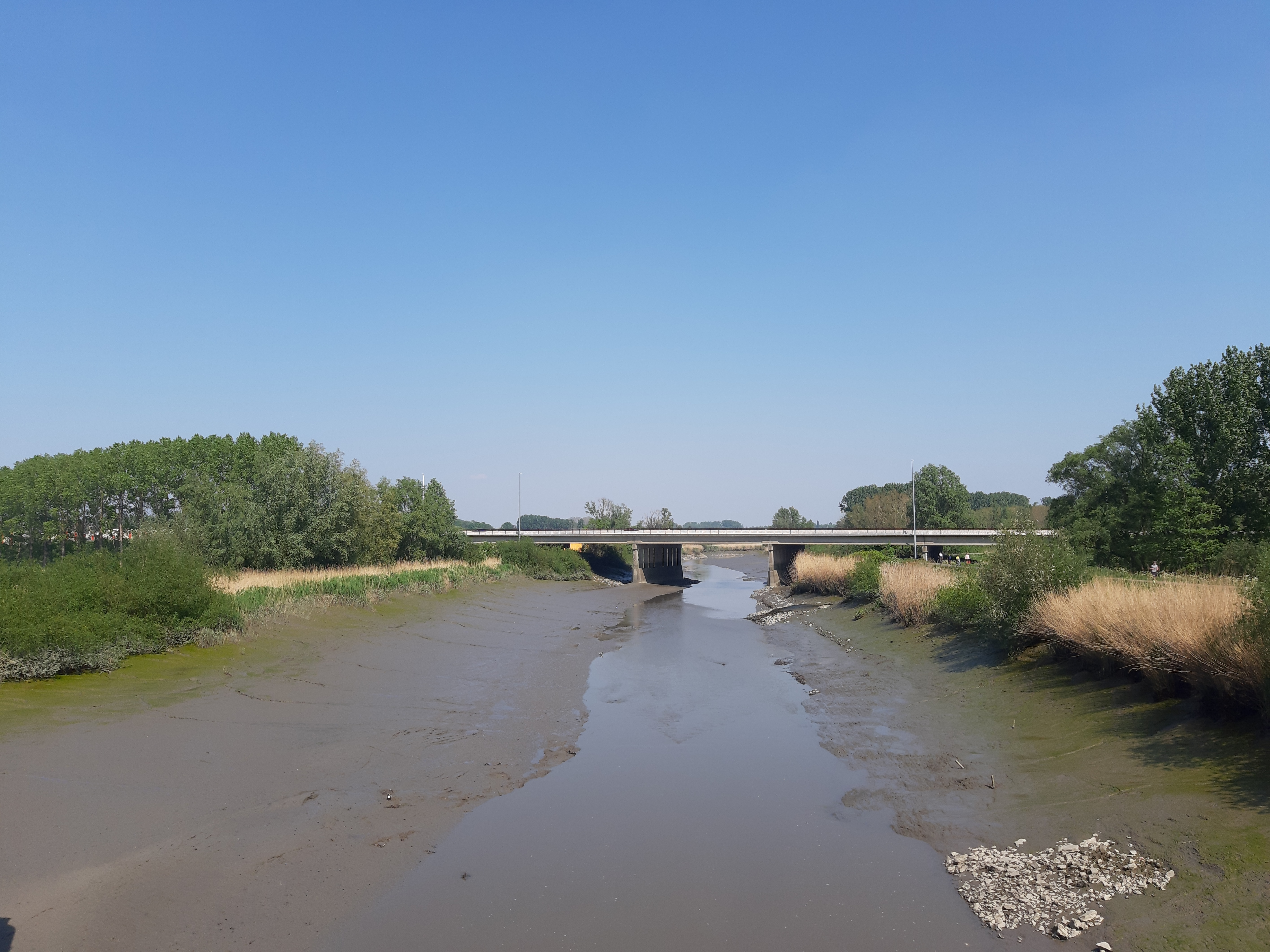 De Durme bij de Mirabrug